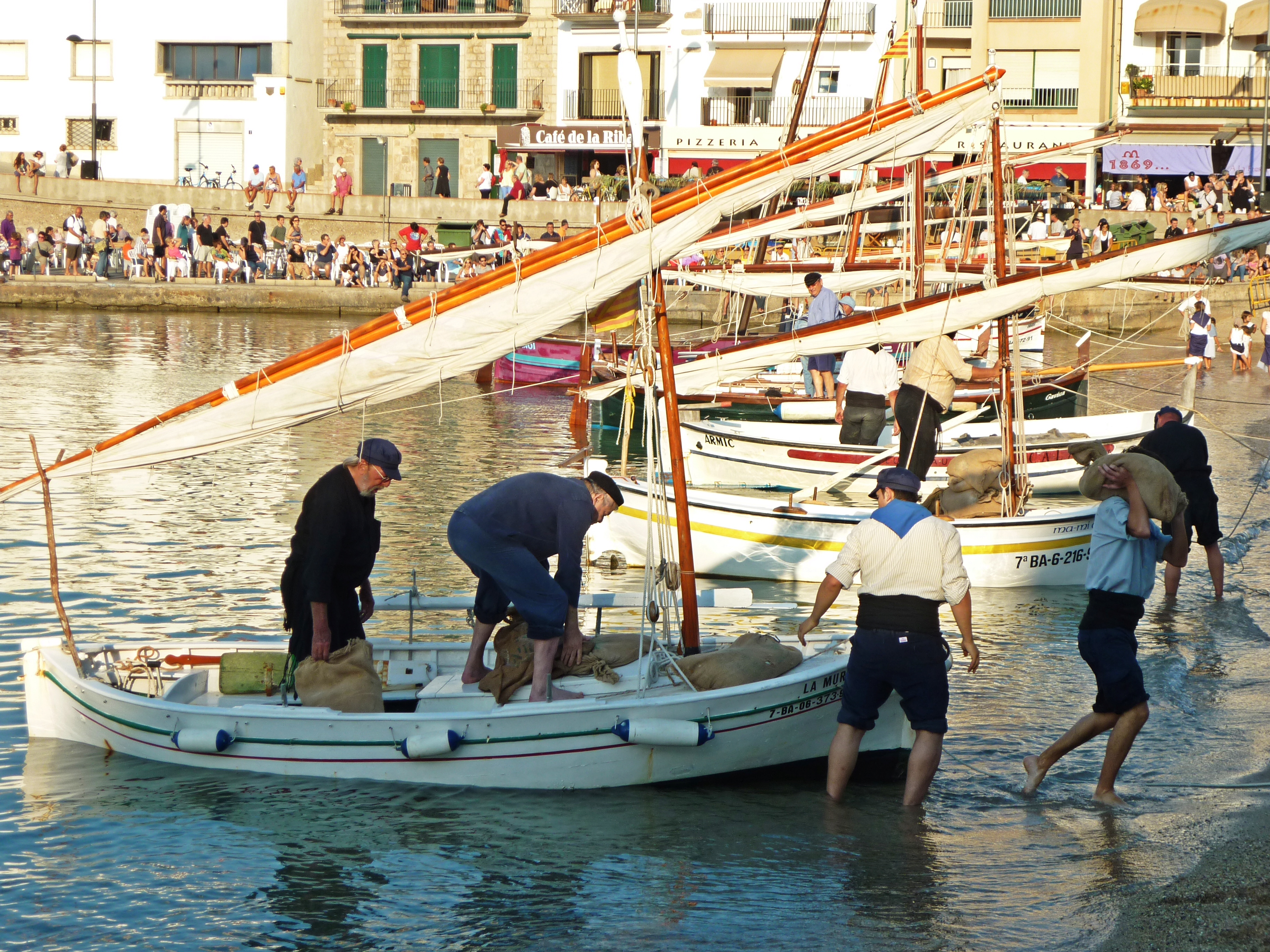 Festa tradicional a L'Escala